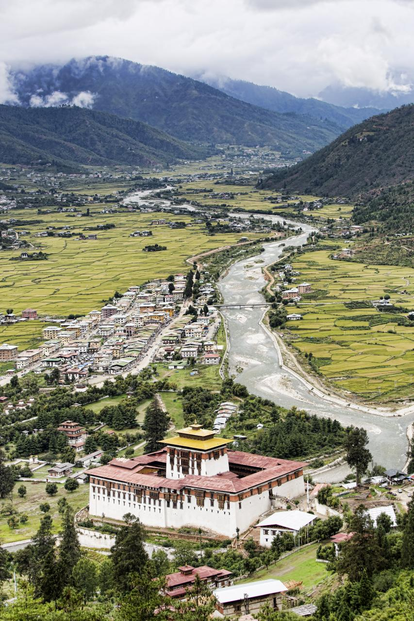 Bhutan